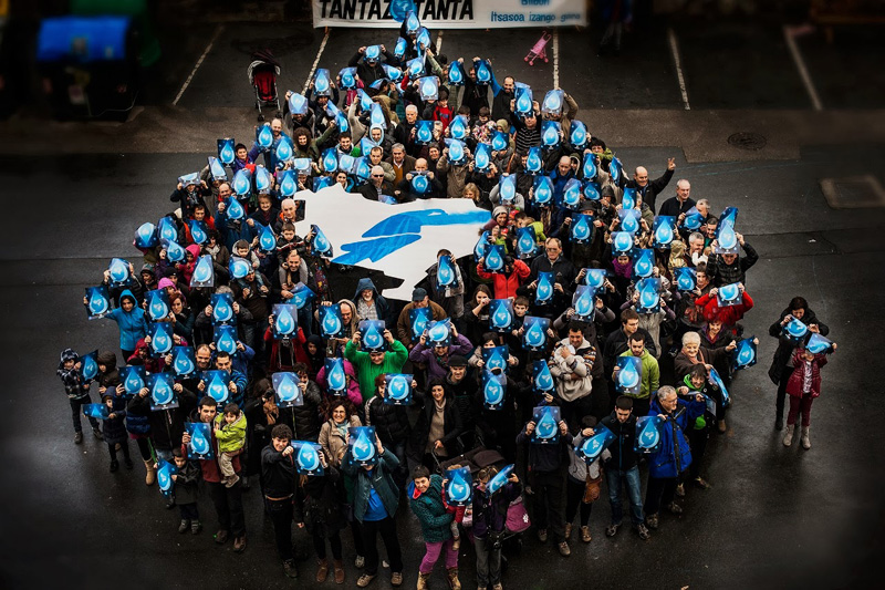 Tantaz Tanta ekimeneko ekitaldia, Diman (Bizkaia)